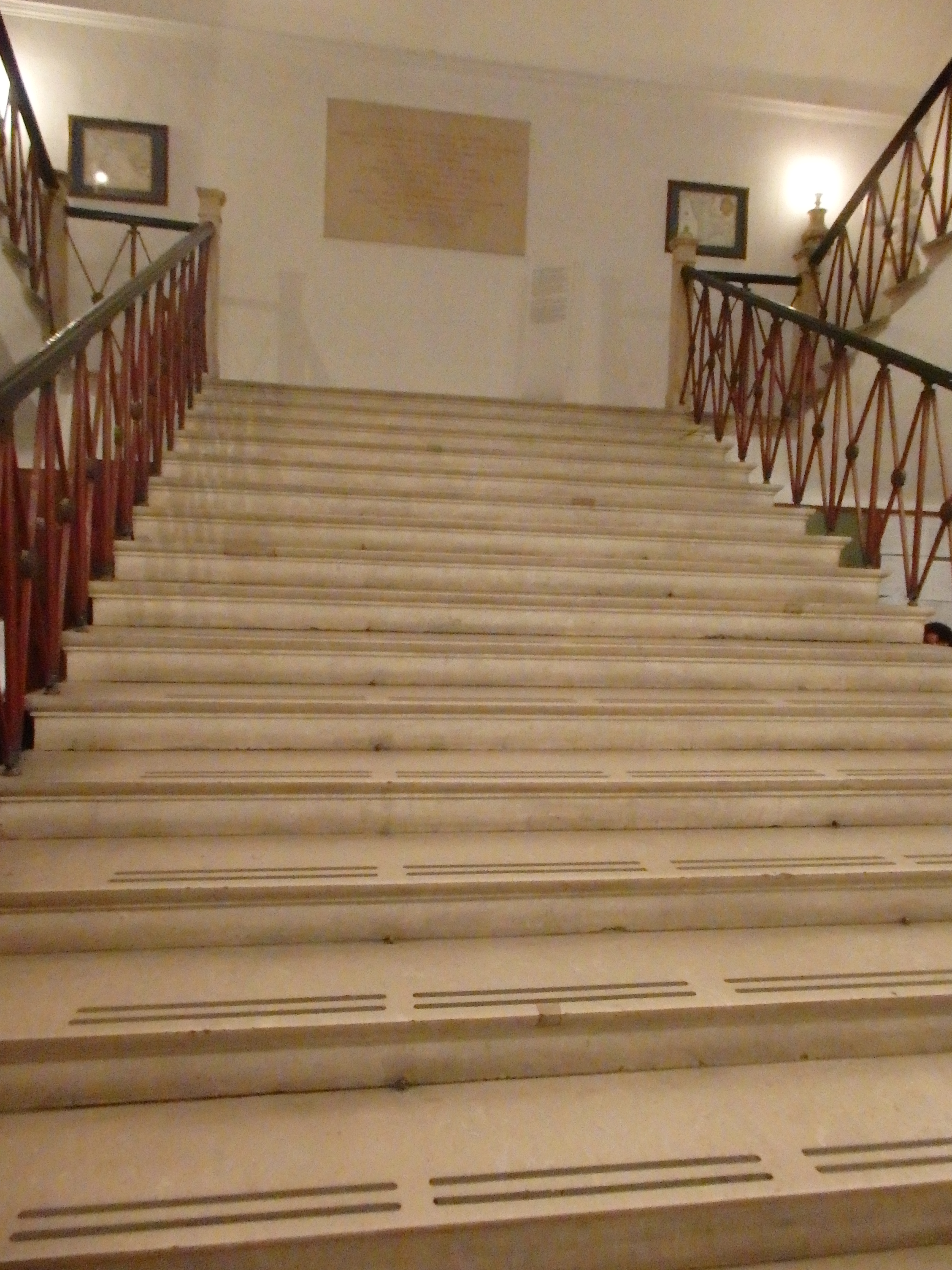 Ingresso e interni della biblioteca nazionale di Napoli.